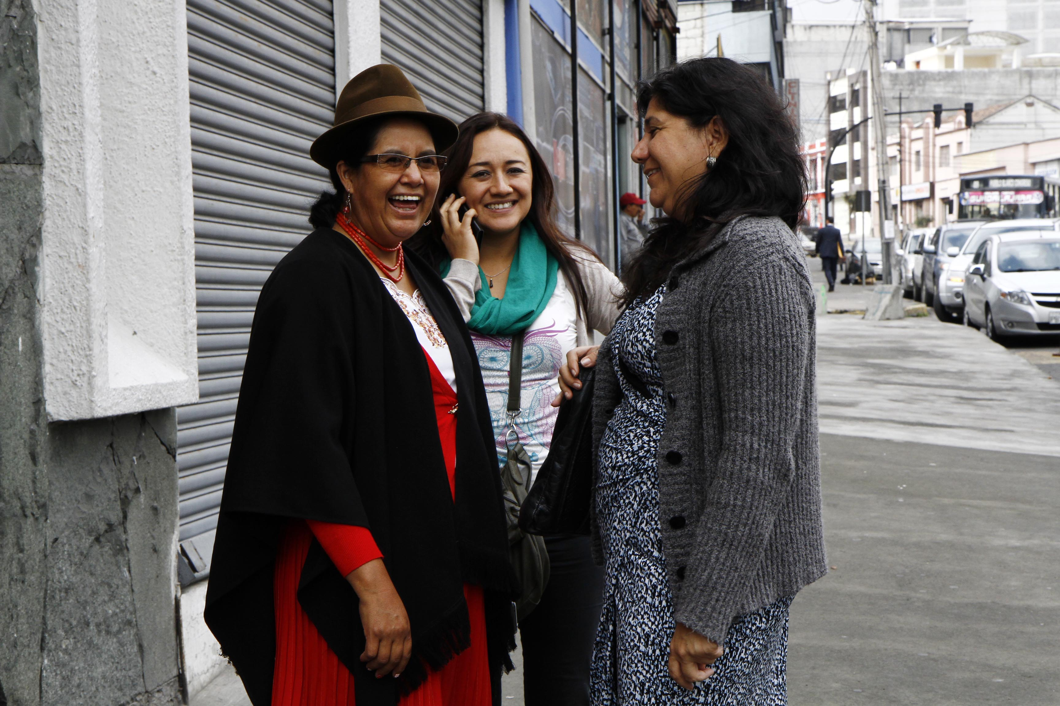 Quito, 10 feb (ANDES).- Esta mañana los jueces de la corte Constitucional analizaron el caso Mery Zamora. A las afueras del edificio varios simpatizantes demostraron con pancartas su apoyo a la dirigente de los maestros. Foto: Micaela Ayala V./ANDES